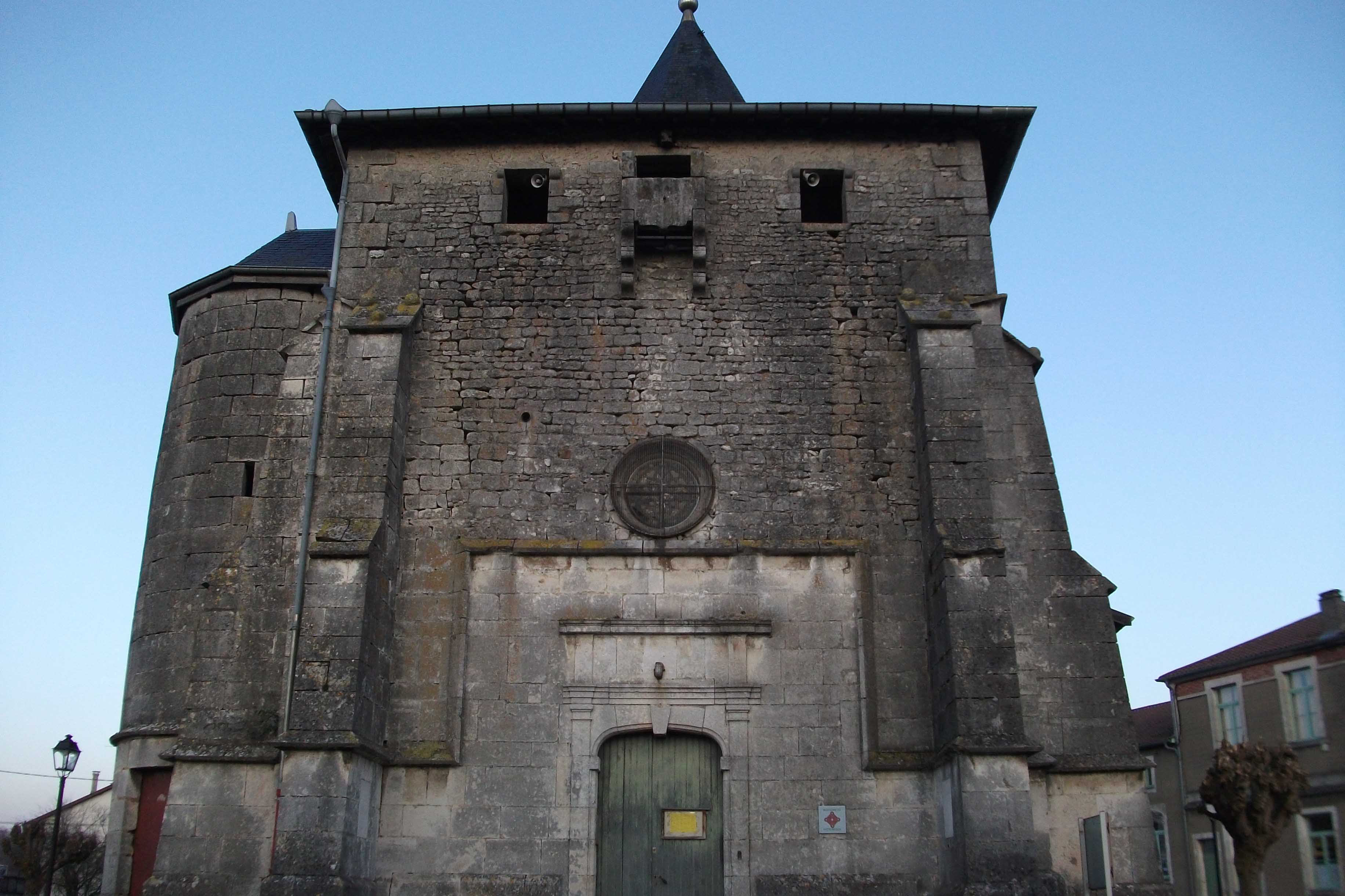 vue du porche_de l'église de Tronville_en_Barrois_.